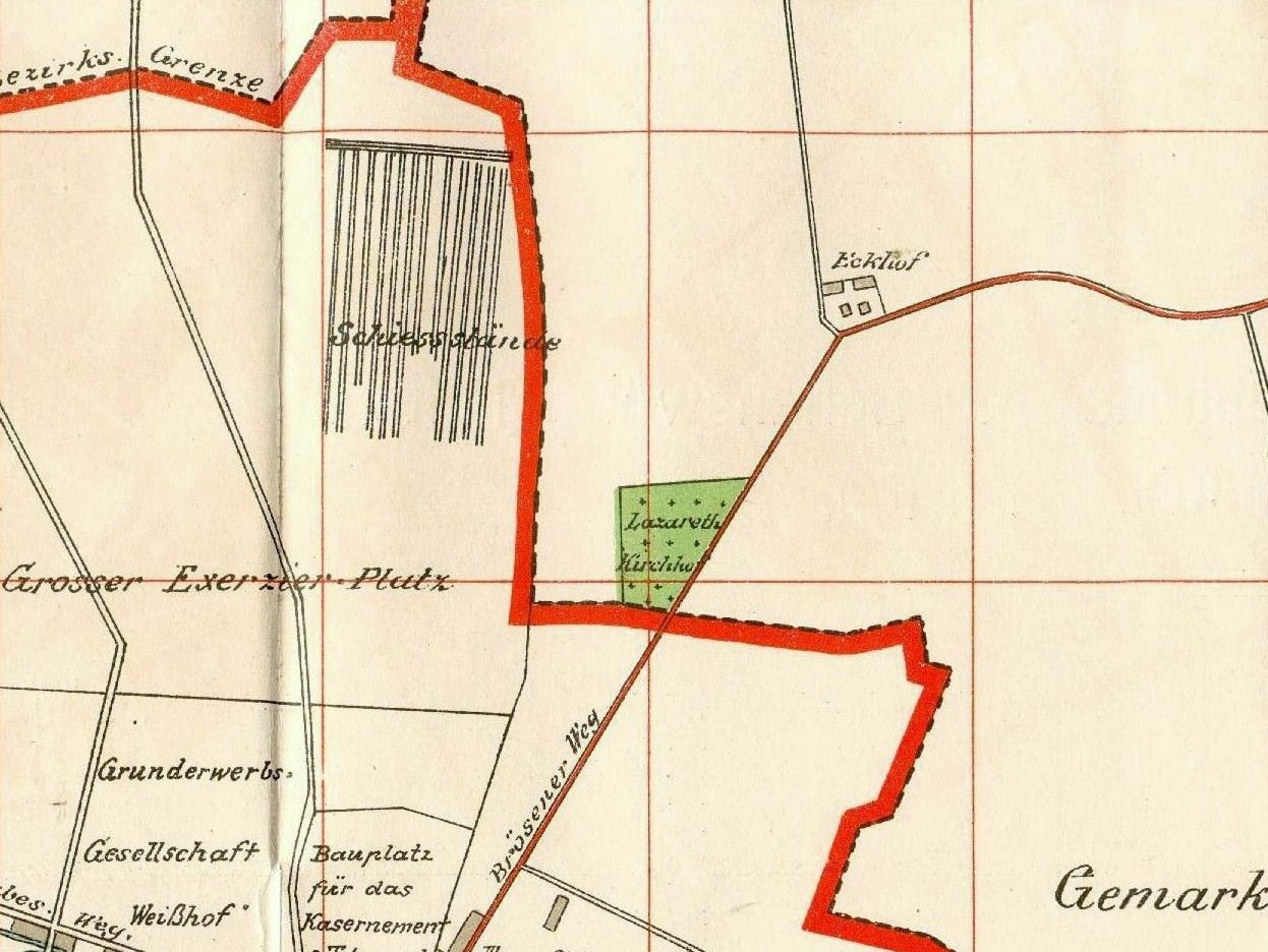 Gdańsk. Cmentarz Ofiar Terroru Hitlerowskiego - Pomnik Bohaterów Zaspa, ul. Chrobrego i Eckhof (Dwór Rozstaje) na mapie z 1912 r.